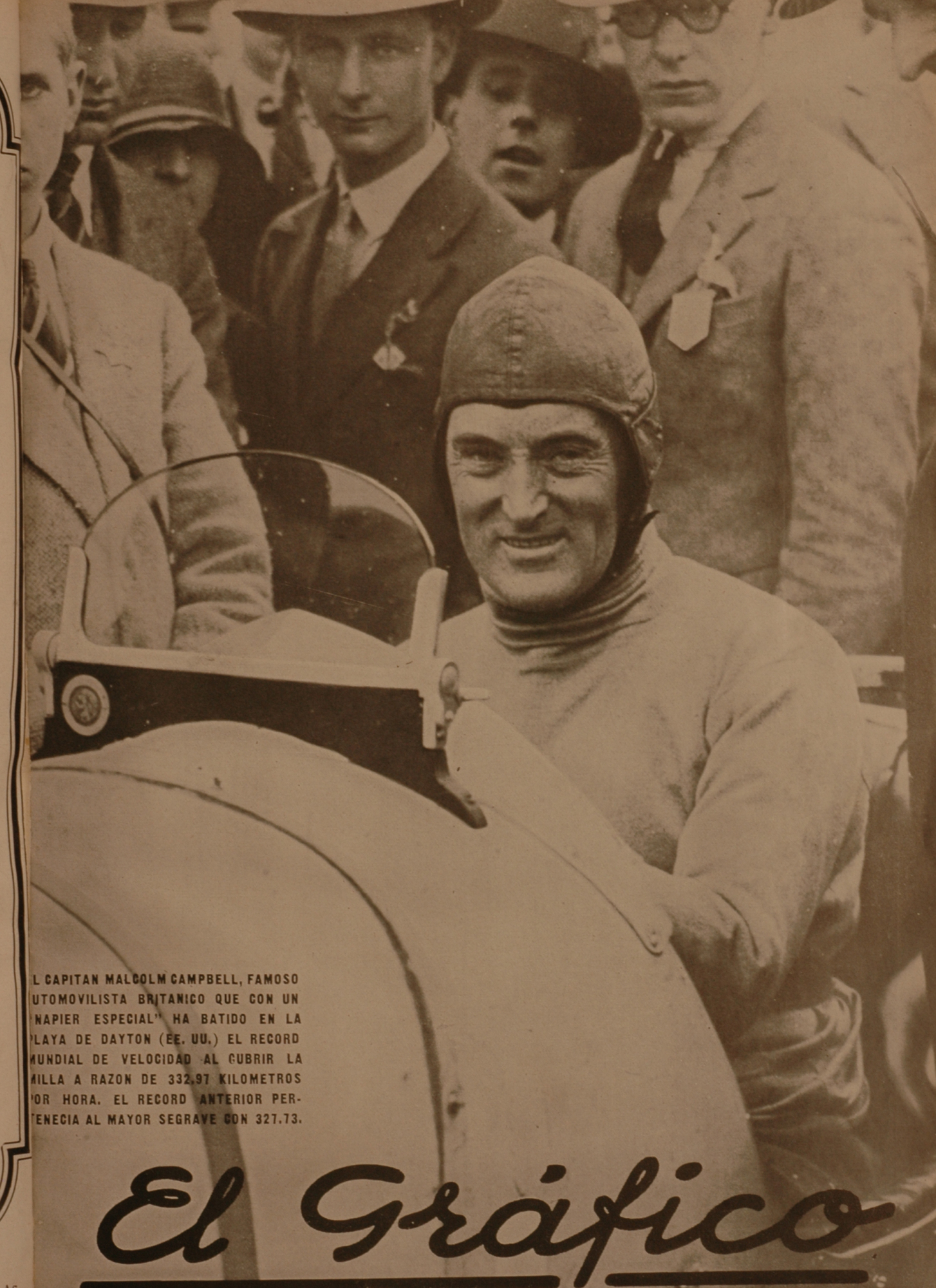 El Grafico del 25 de Febrero de 1928. Edicion 451